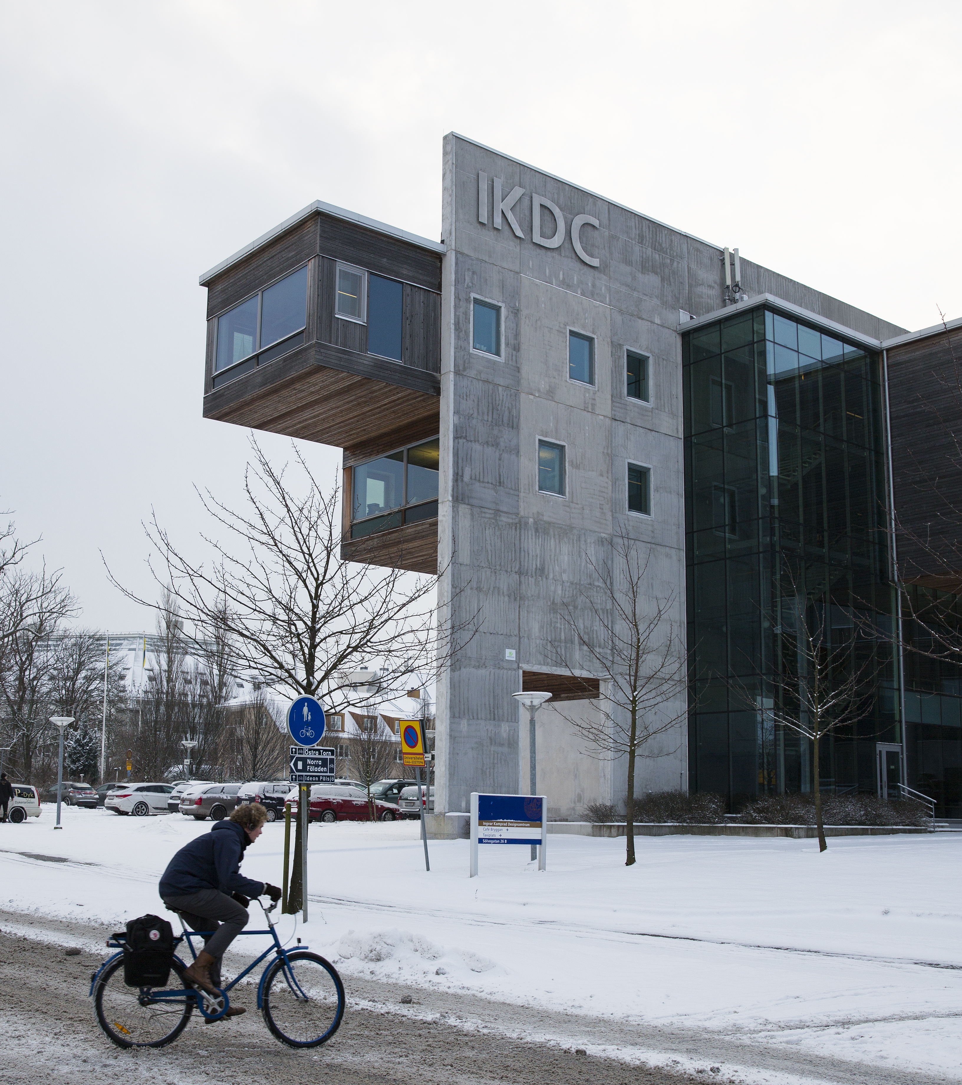 Ingvar Kamprad Designcentrum, IKDC, vid Lunds Tekniska Högskola, som som invigdes 2002 sedan Stichting Ikea Foundation donerat 250 miljoner kronor till långsiktigt stöd av forskning inom industridesign. Foto: News Øresund - Johan Wessman © News Øresund. Bilden får fritt publiceras under förutsättning att källa anges (Foto: News Øresund + fotografnamn). The picture can be used freely under the prerequisite that the source is given (Photo: News Øresund + the name of the photografer. Originalfil tillhandahålles gratis, kontakta: News Øresund, Malmö, Sweden. News Øresund är en oberoende regional nyhetsbyrå som ingår i projektet Øresund Media Platform som drivs av Øresundsinstituttet i partnerskap med Lunds universitet och Roskilde Universitet och med delfinansiering från EU (Interreg IV A Öresund) och 14 regionala, icke kommersiella, aktörer.